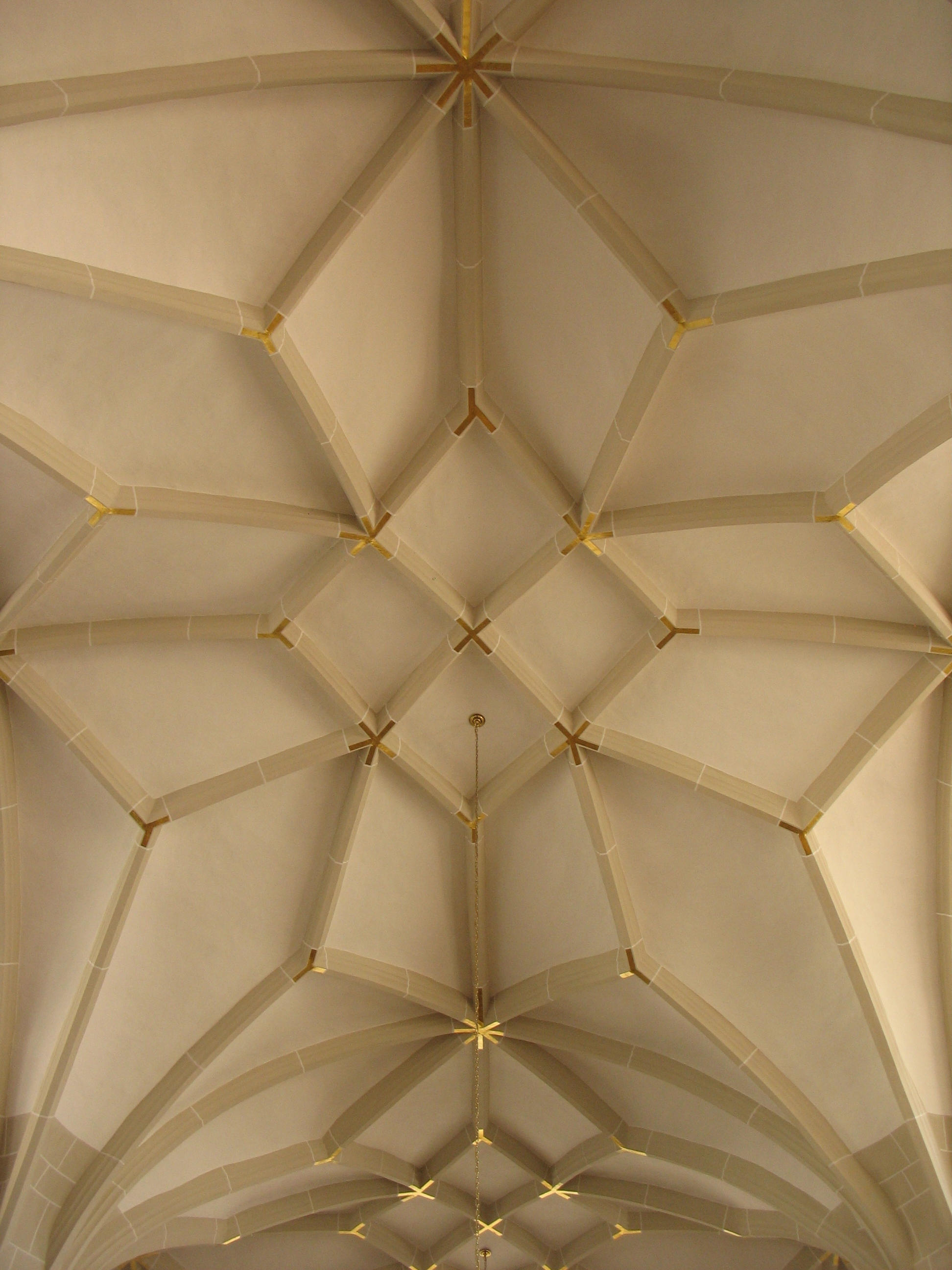 Plauen, St. Johanniskirche: Deckengewölbe